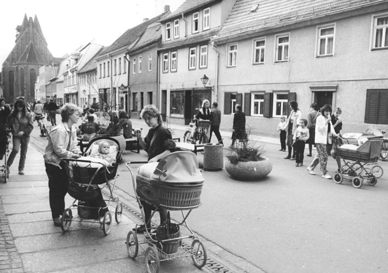 Delitzsch, Breite Straße, Passanten ADN-ZB Gahlbeck 13.4.1989 Bez. Leipzig-Wahl-Bilanz-Junge Mütter mit Kinderwagen trifft man überall in Delitzsch, vor allem in der Breiten Straße. Für rund ein Drittel der 23000 Bürger dieser sächsischen Kreisstadt verbesserten sich die Wohnbedingungen. Auch bei den Altbauten im Zentrum sind heute 84 Prozent aller Wohnungen mit Bad oder Dusche ausgestattet. Seit 1984 wurden 646 Wohnungen um- und ausgebaut oder modernisiert und 106 Fassaden instandgesetzt. (siehe auch 13 und 14N)